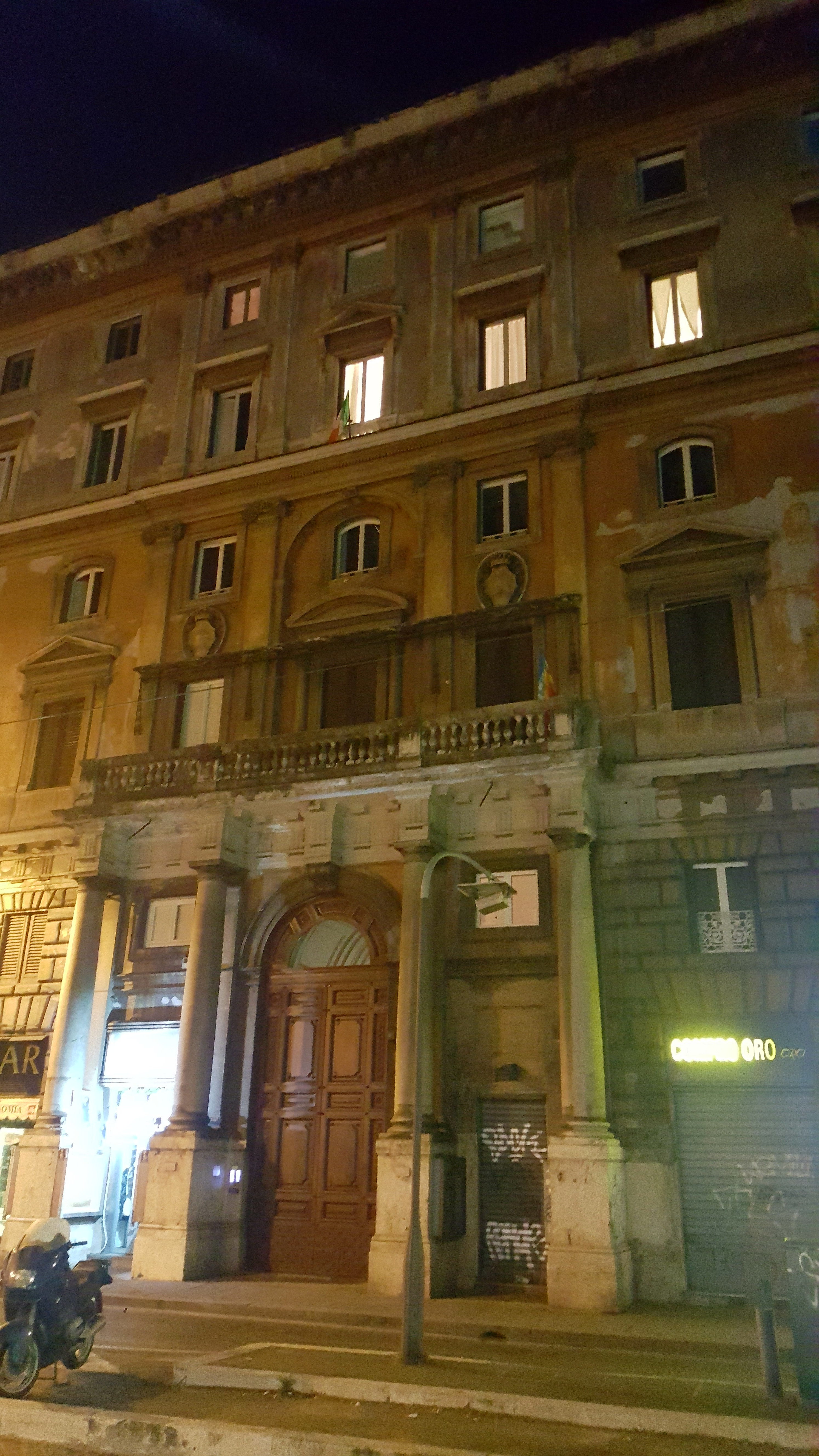 Sede centrale di Sinistra Ecologia e Libertà a Roma, Via Arenula, 29.